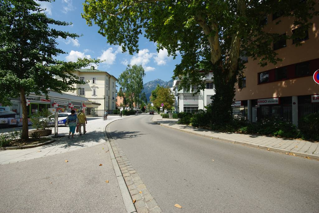 Liebigstraße in 83435 Bad Reichenhall